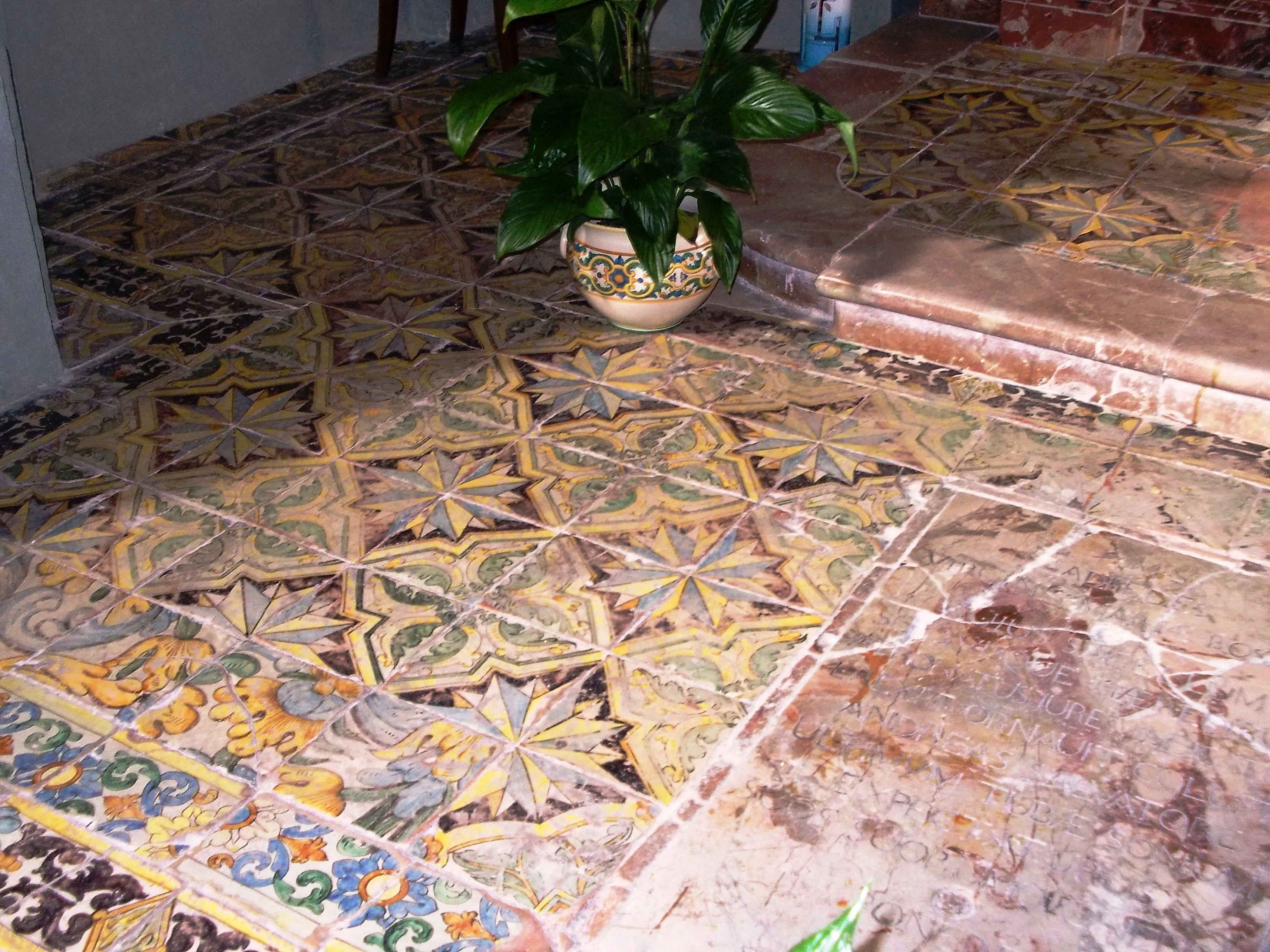 Pavimento in ceramica cerretese antica nella cappella della Madonna del Rosario, Collegiata di San Martino, Cerreto Sannita.